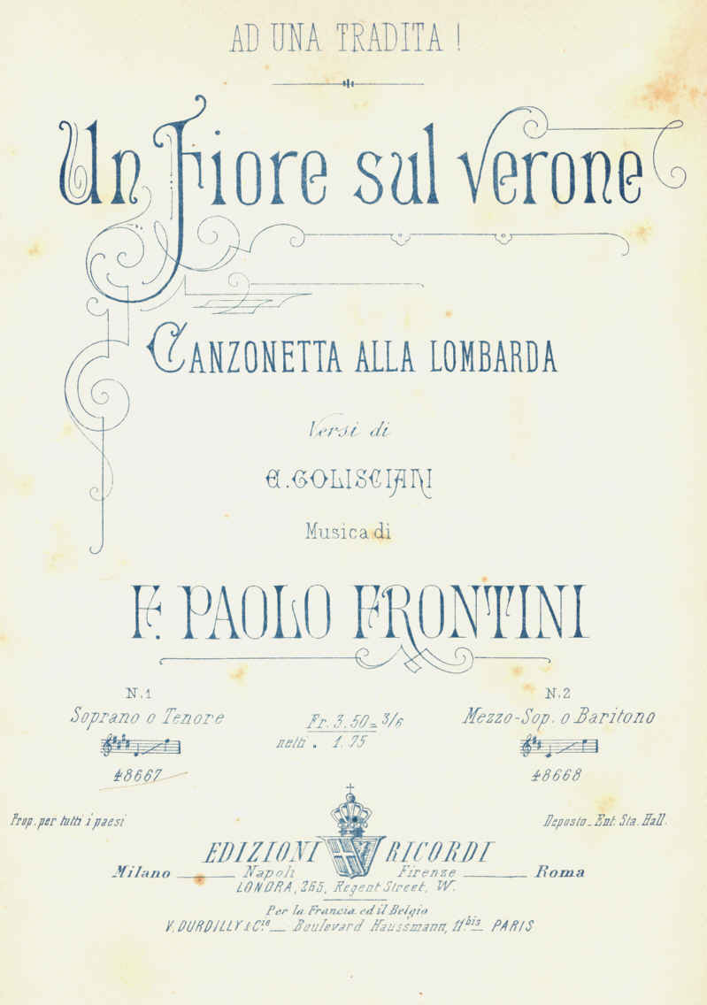 Un fiore sul verone, versi di Enrico Golisciani, ed. Ricordi, 1883